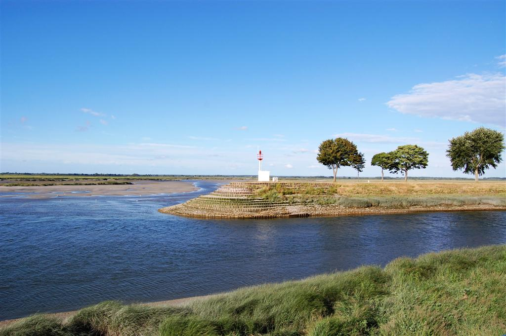 De ingang van het Canal-de-la-Somme te Valery-sur-Somme vanuit de baai.